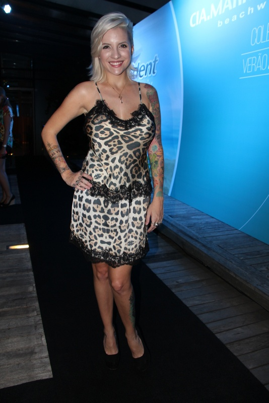 15 - Clara-004